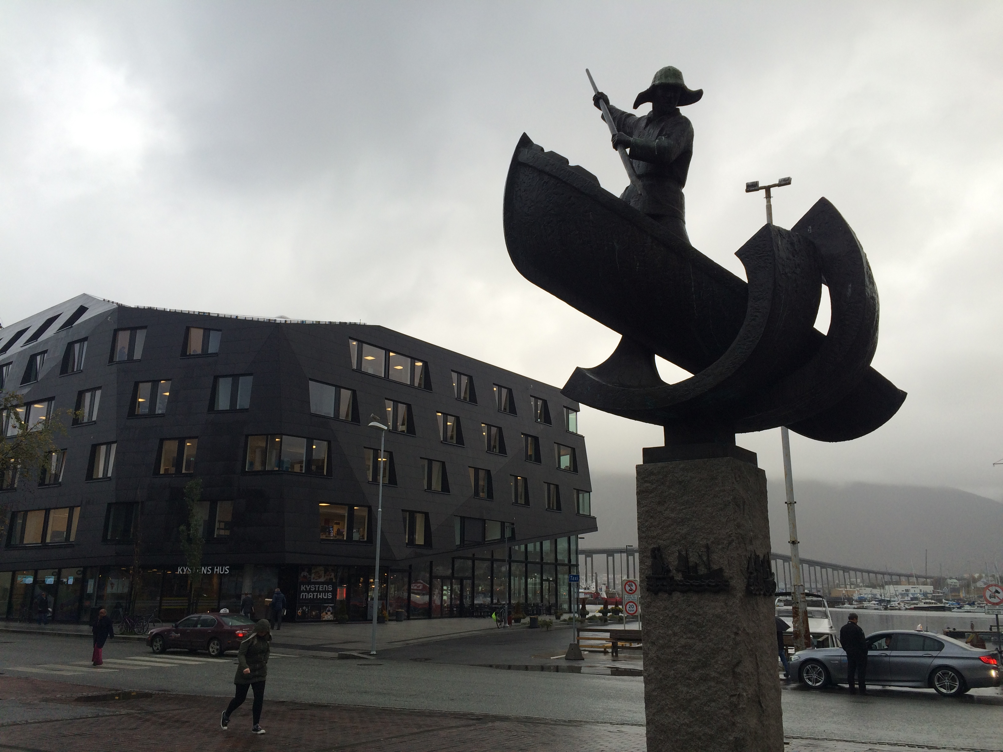 Råfisklaget holder til i 4. etasje i Kystens Hus.